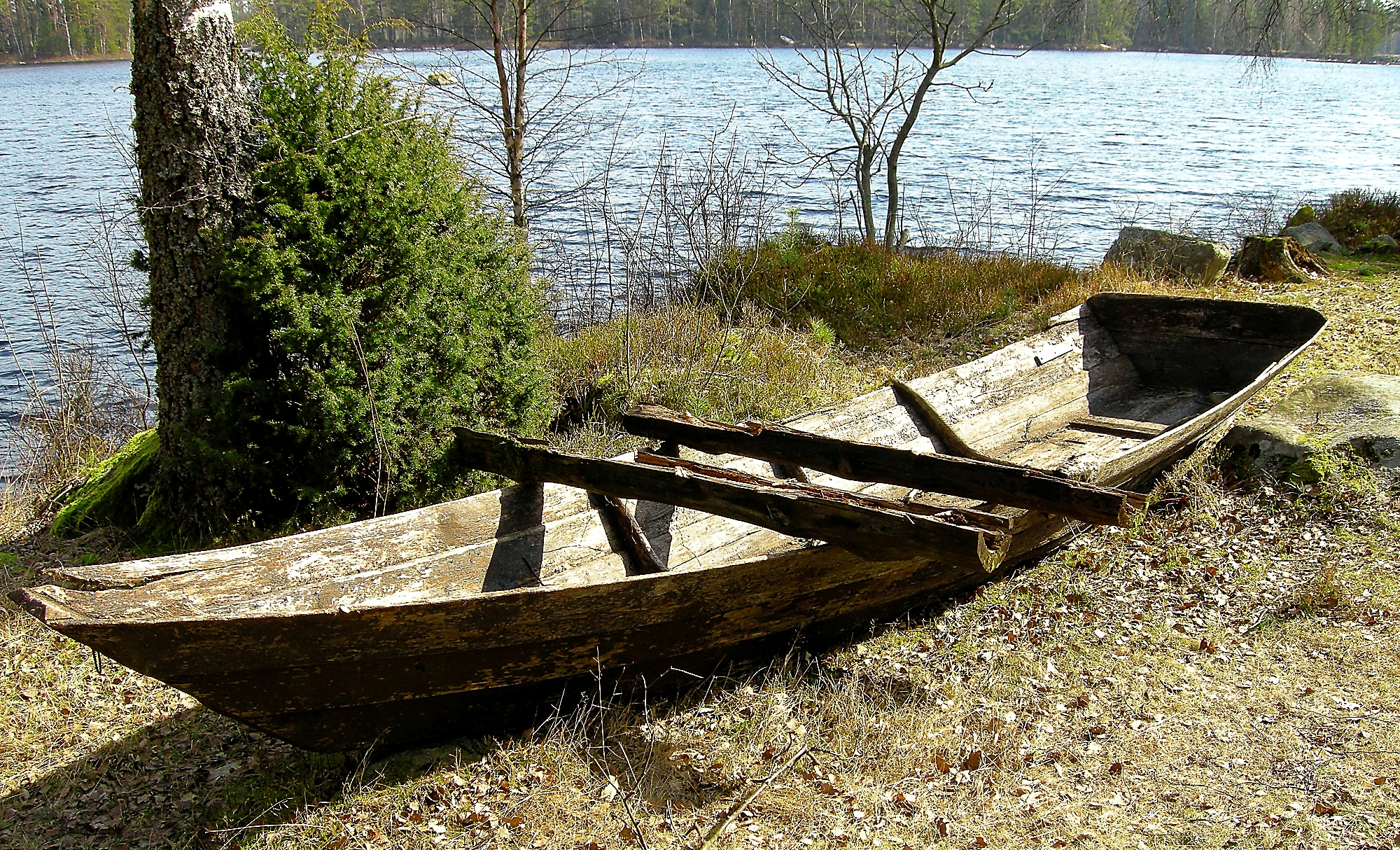 Derelict boat, Sweden